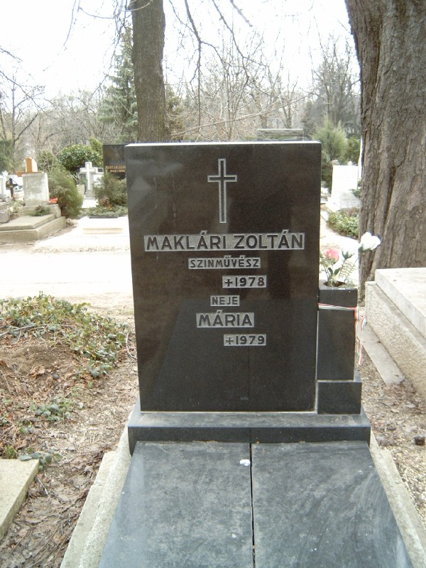 Maklári Zoltán sírja Budapesten. Farkasréti temető: 25-1-68.